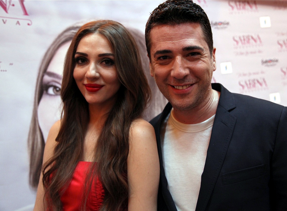 Sabina and Željko